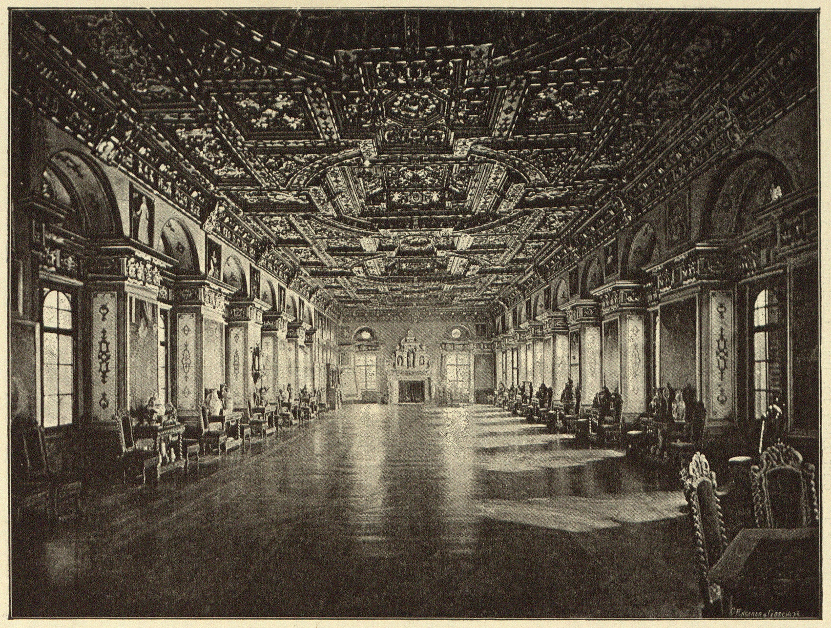 Heiligenberg, Schloss, Rittersaal Abbildung aus: Franz Xaver Kraus: Die Kunstdenkmäler des Grossherzogthums Baden. Band 1: Die Kunstdenkmäler des Kreises Konstanz. Freiburg i. Br. 1887